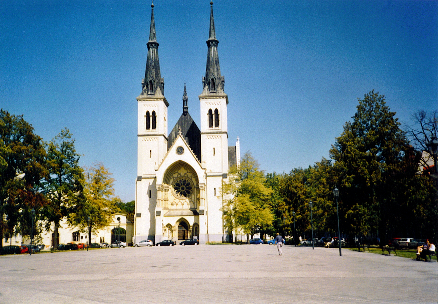 Kostel Neposkvrněného početí Panny Marie